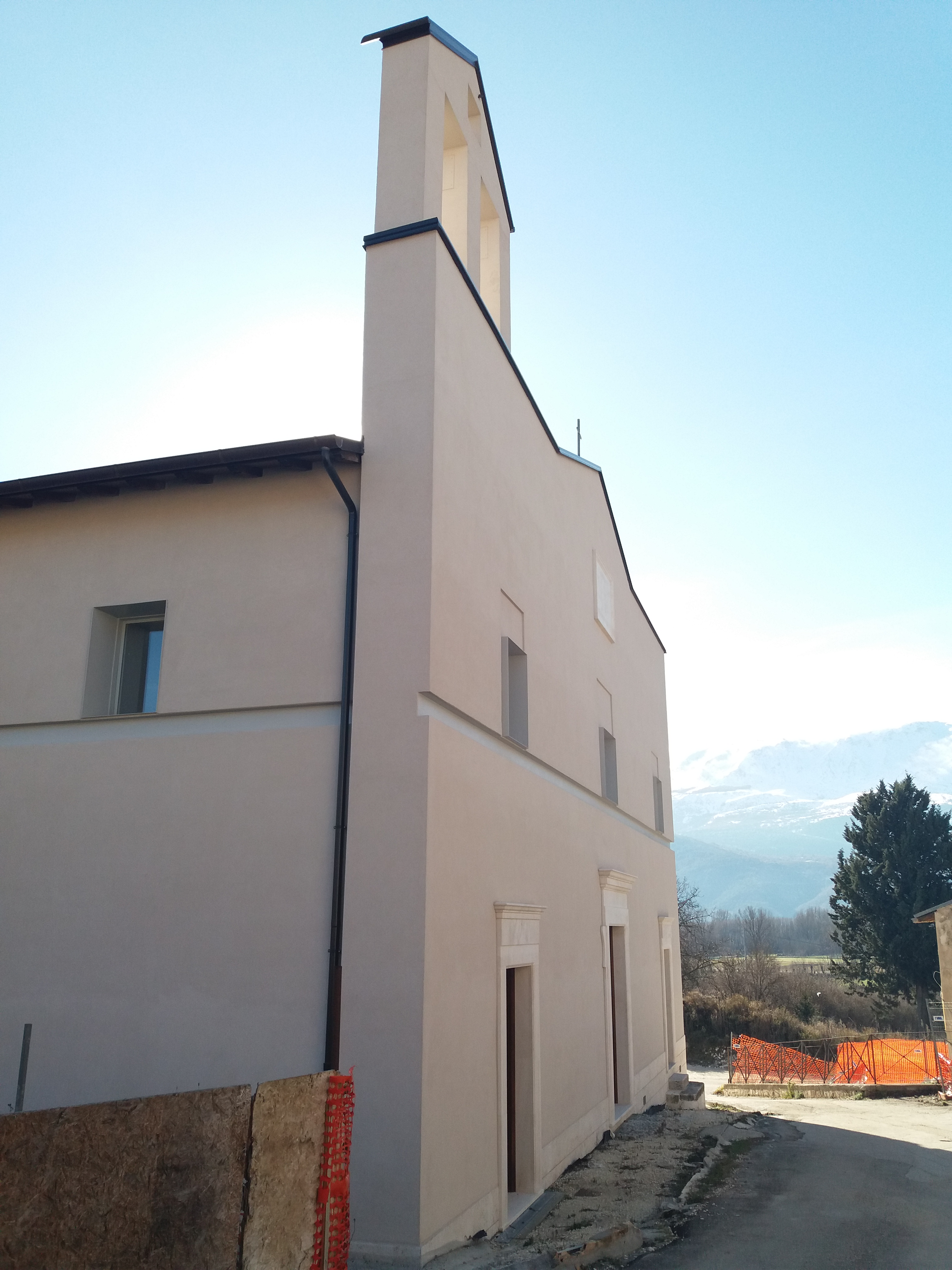 L'Aquila: Chiesa di San Gregorio Magno